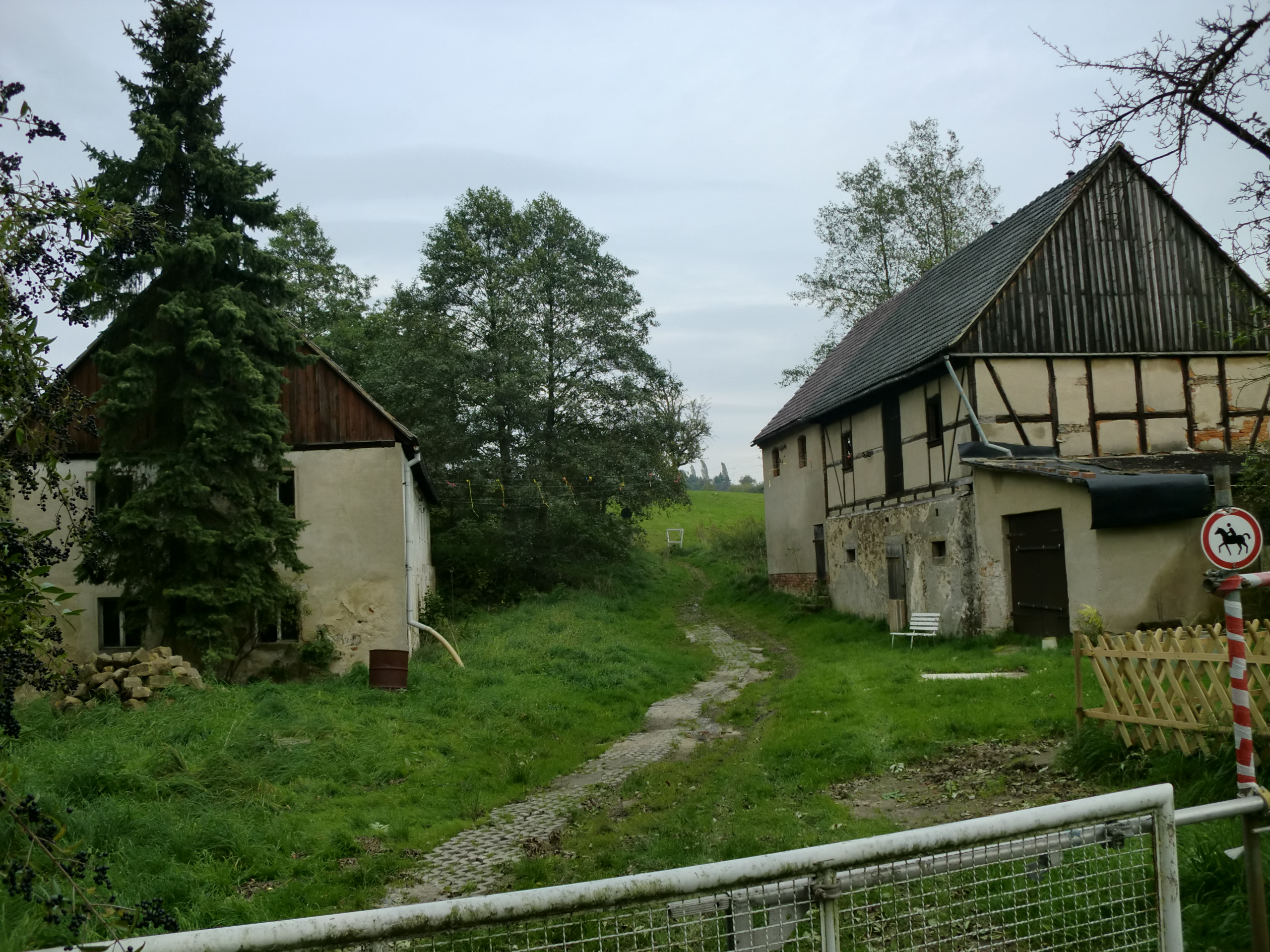 Verlassene Karsch-Mühle am Keppbach 1